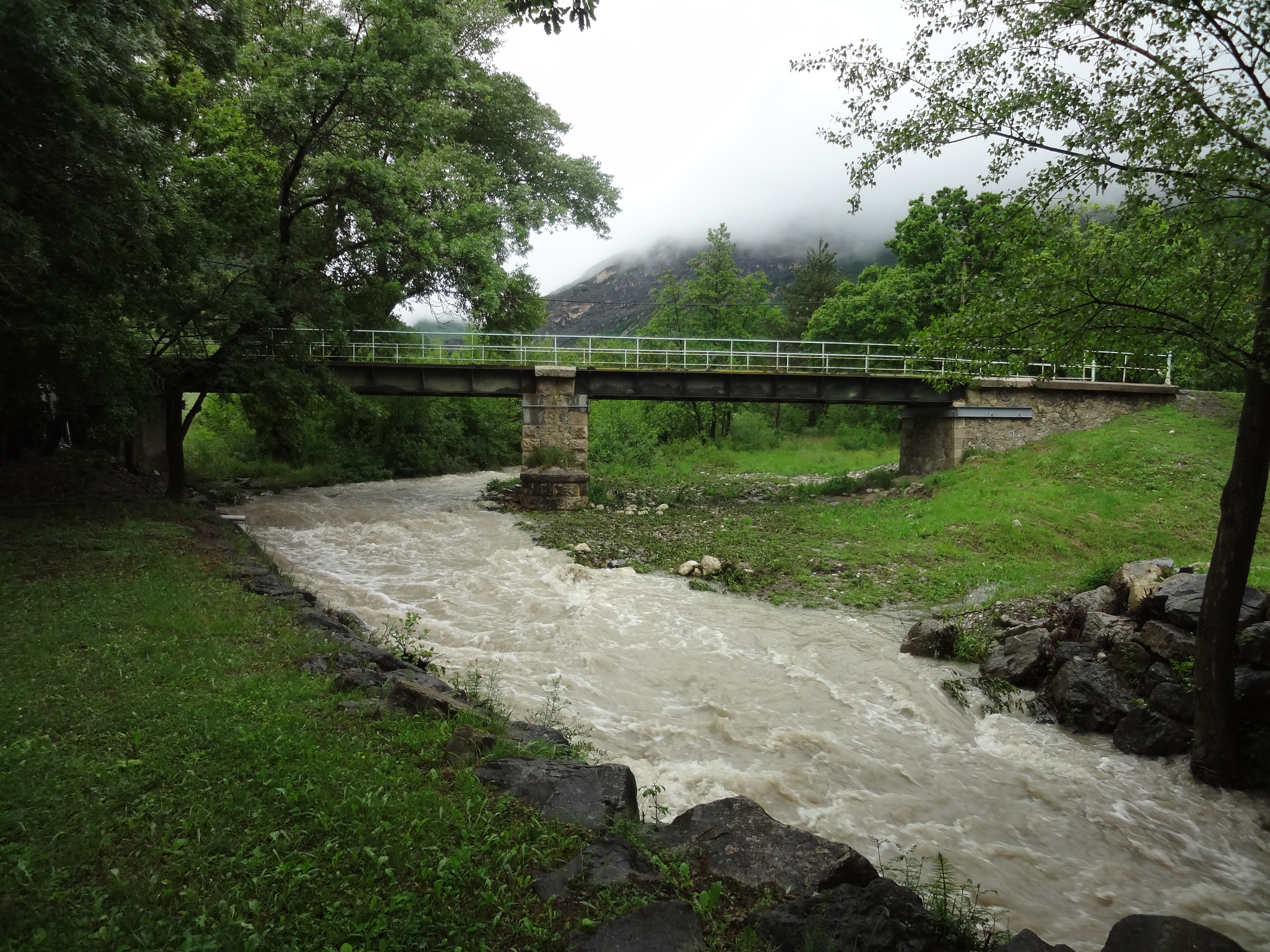 Et pont proche de la mairie